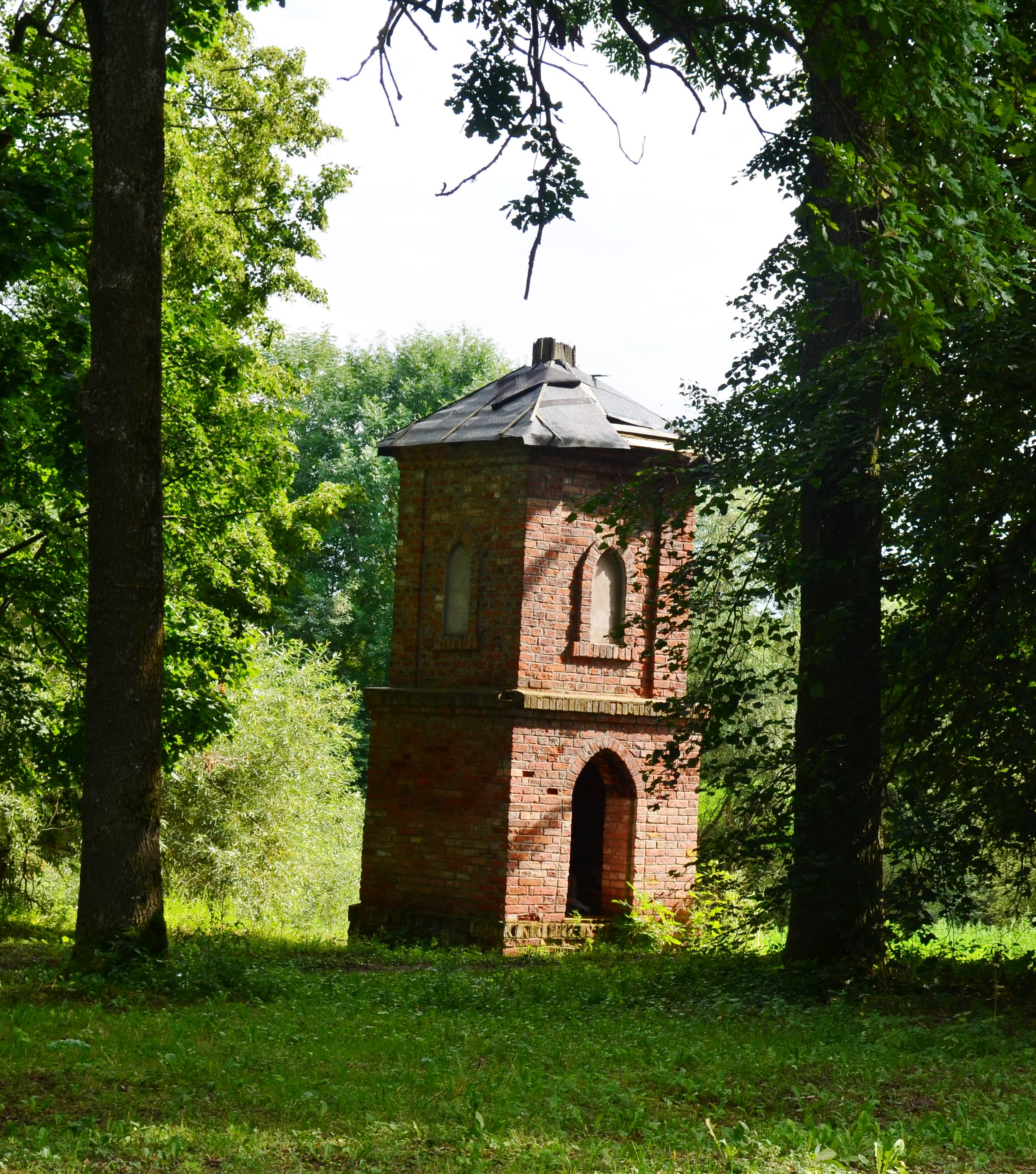 Sirutiškio dvaro koplyčia, Kėdainių raj.